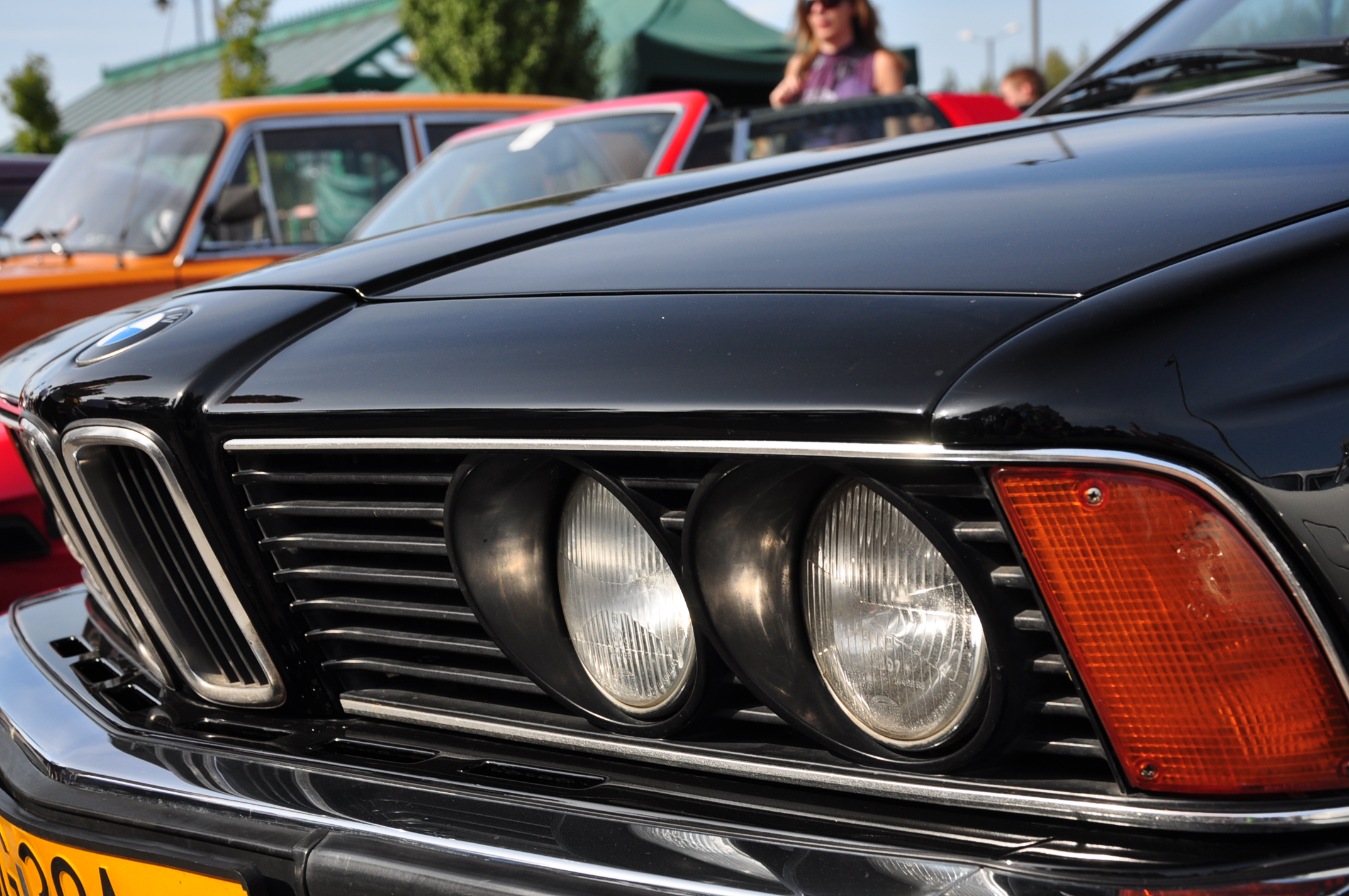 BMW serii 6, e24.